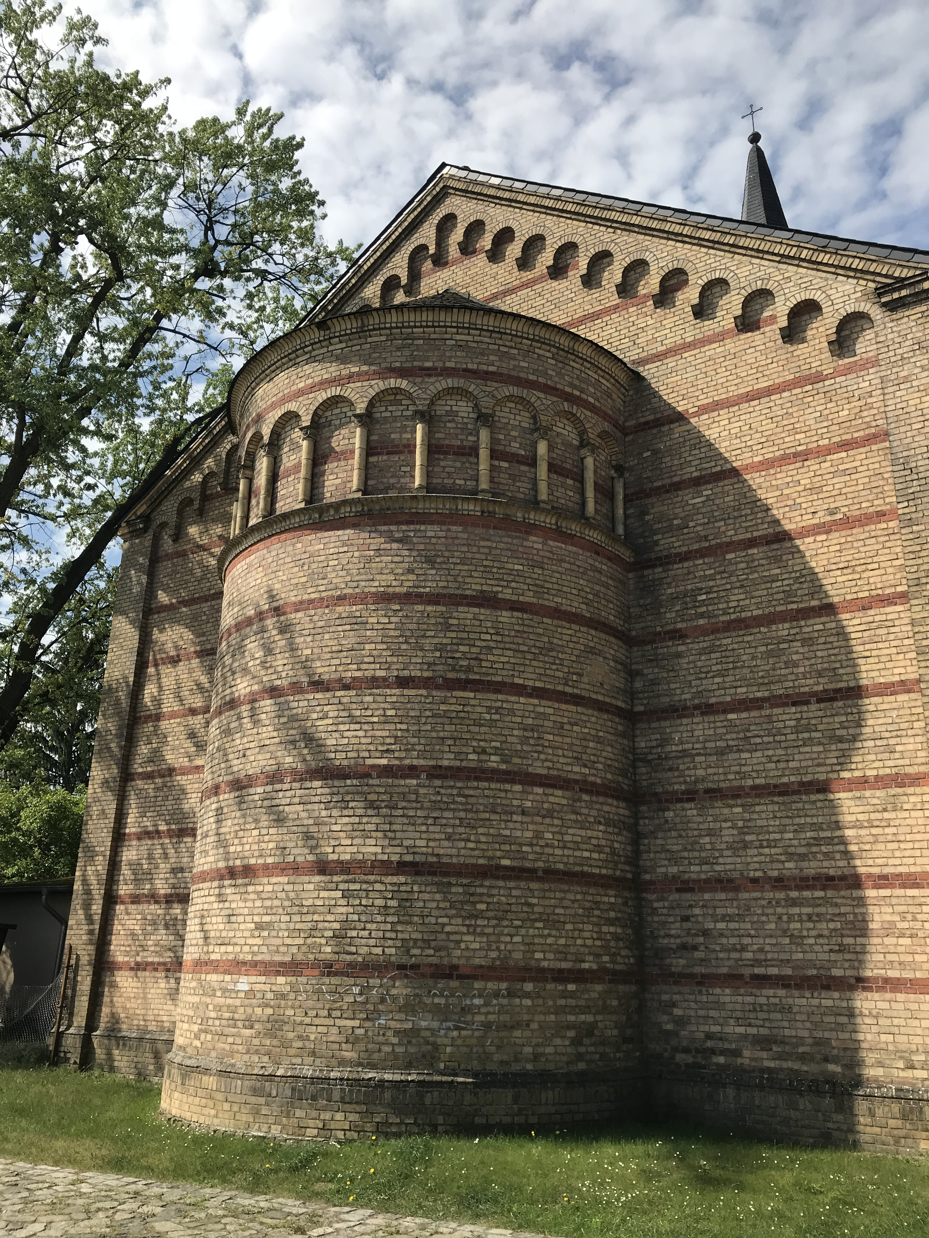 Die Dorfkirche in Kagel ist eine Saalkirche aus den Jahren 1869 bis 1871 in Grünheide (Mark) im Landkreis Oder-Spree im Land Brandenburg.